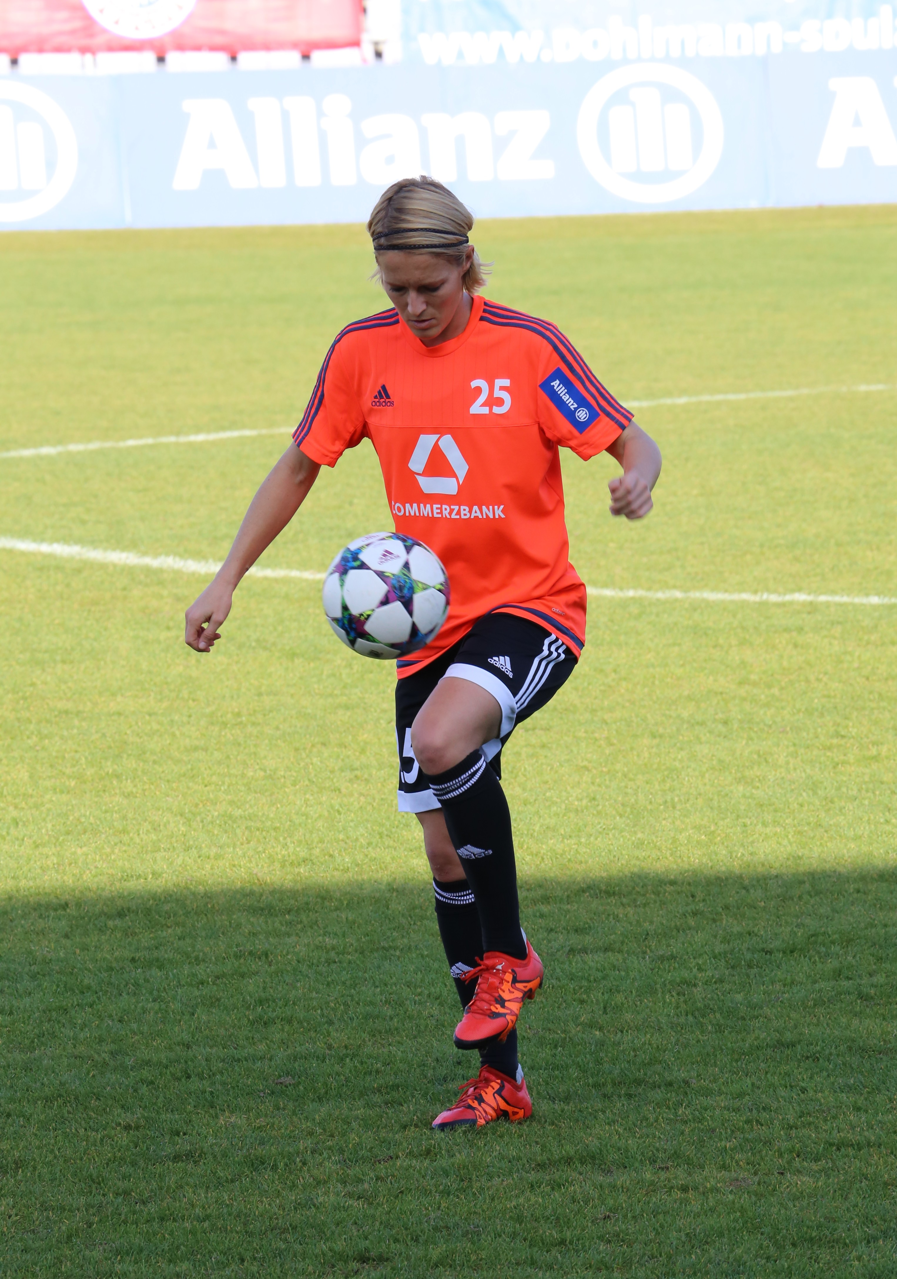 Saskia Bartusiak (1. FFC Frankfurt) (beim Aufwärmen vor dem Spiel) im DFB-Pokal-Achtelfinale zwischen FC Bayern München und 1. FFC Frankfurt, Ergebnis 2:0, Stadion an der Grünwalder Straße